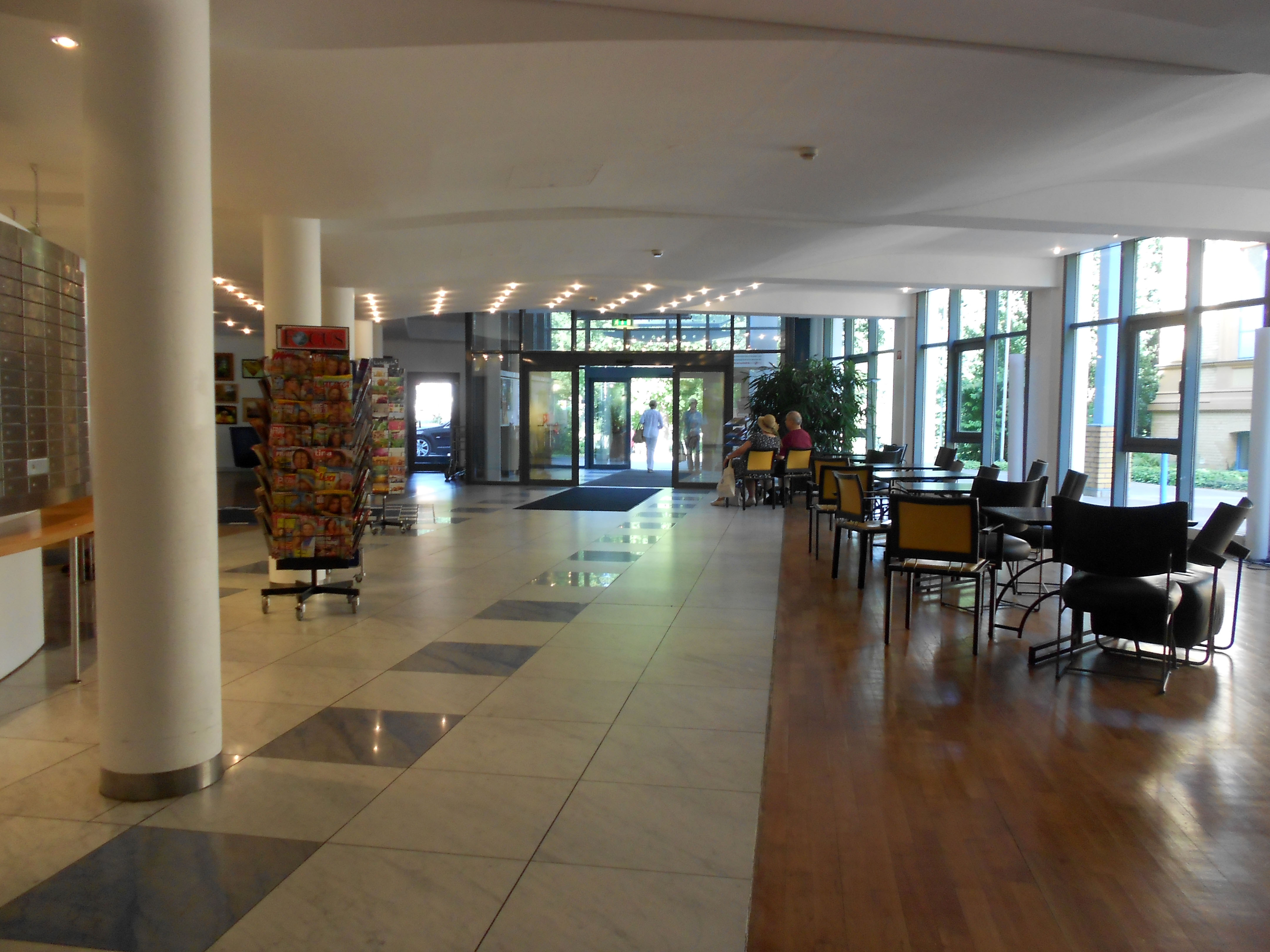 Fachklinik und Moorbad Bad Freienwalde